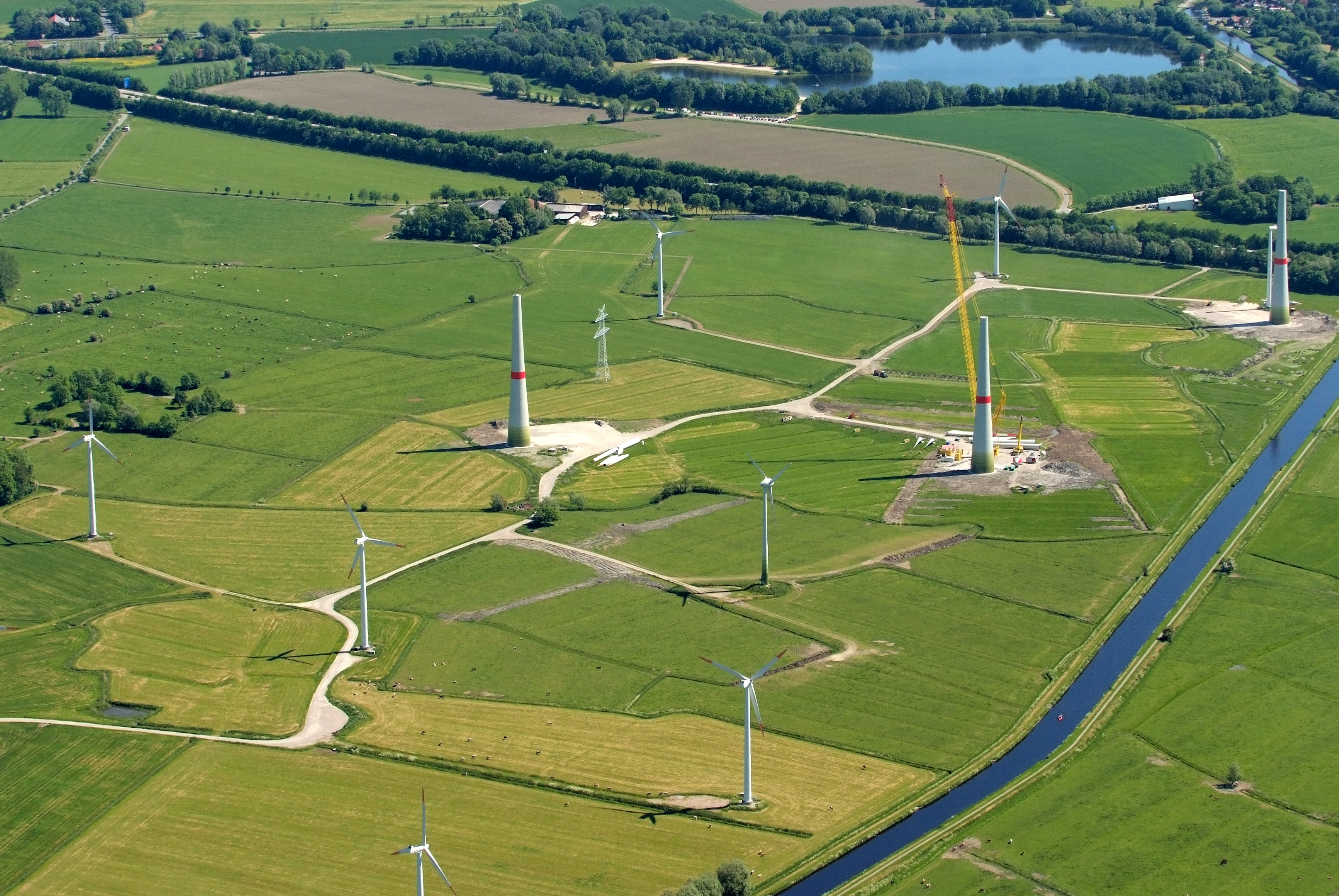 (Teilweise) im Bau befindlicher Windpark nahe Sande im Landkreis Friesland. Im Hintergrund erkennt man die A29 und den Sander See, der Wasserlauf rechts unten ist der Ems-Jade-Kanal. Das Foto entstand auf einem Fotoflug vom Flugplatz Nordholz-Spieka über Cuxhaven und Wilhelmshaven